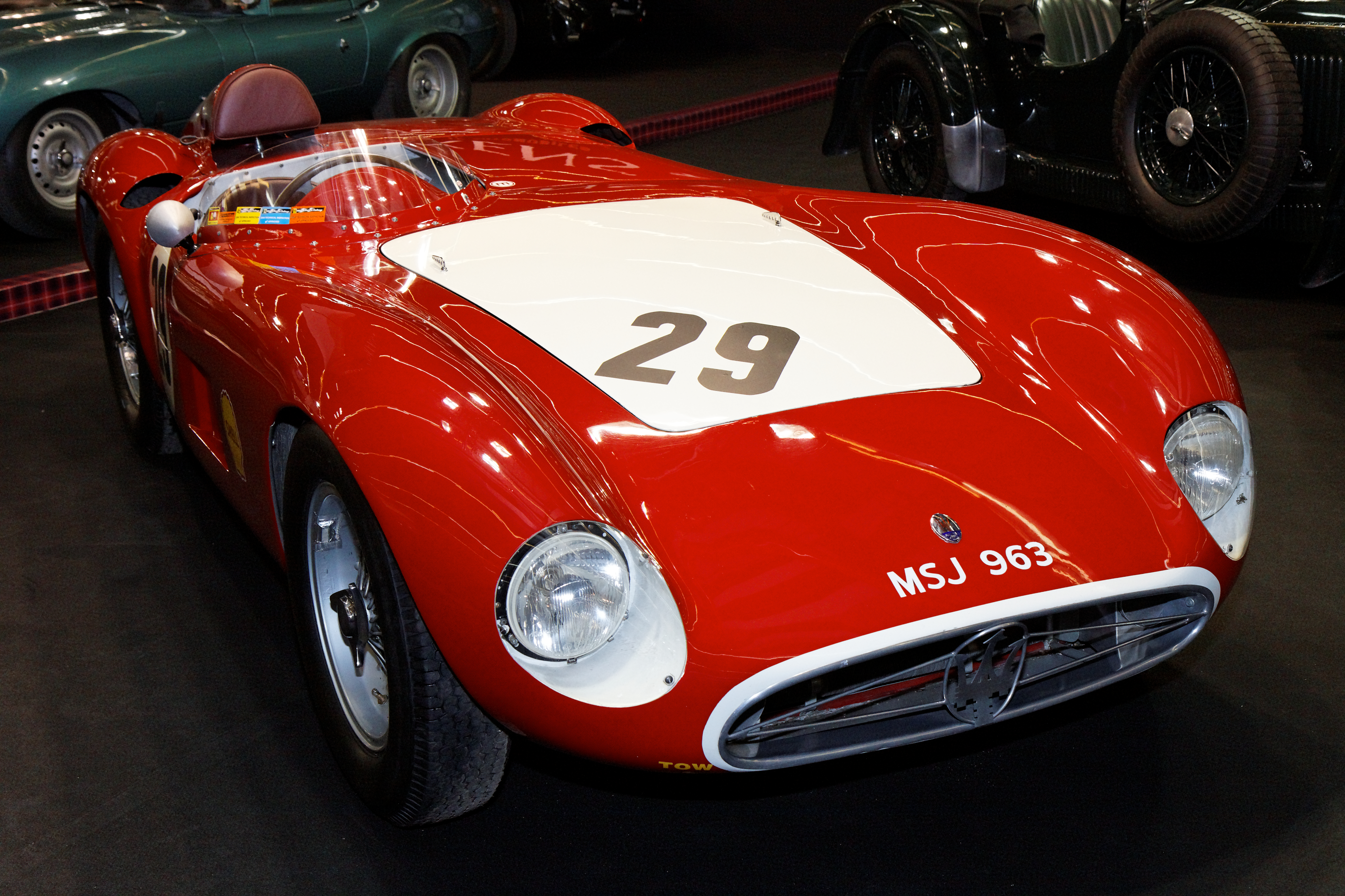 Photographie prise lors du salon rétromobile 2011 à Paris, porte de Versailles.